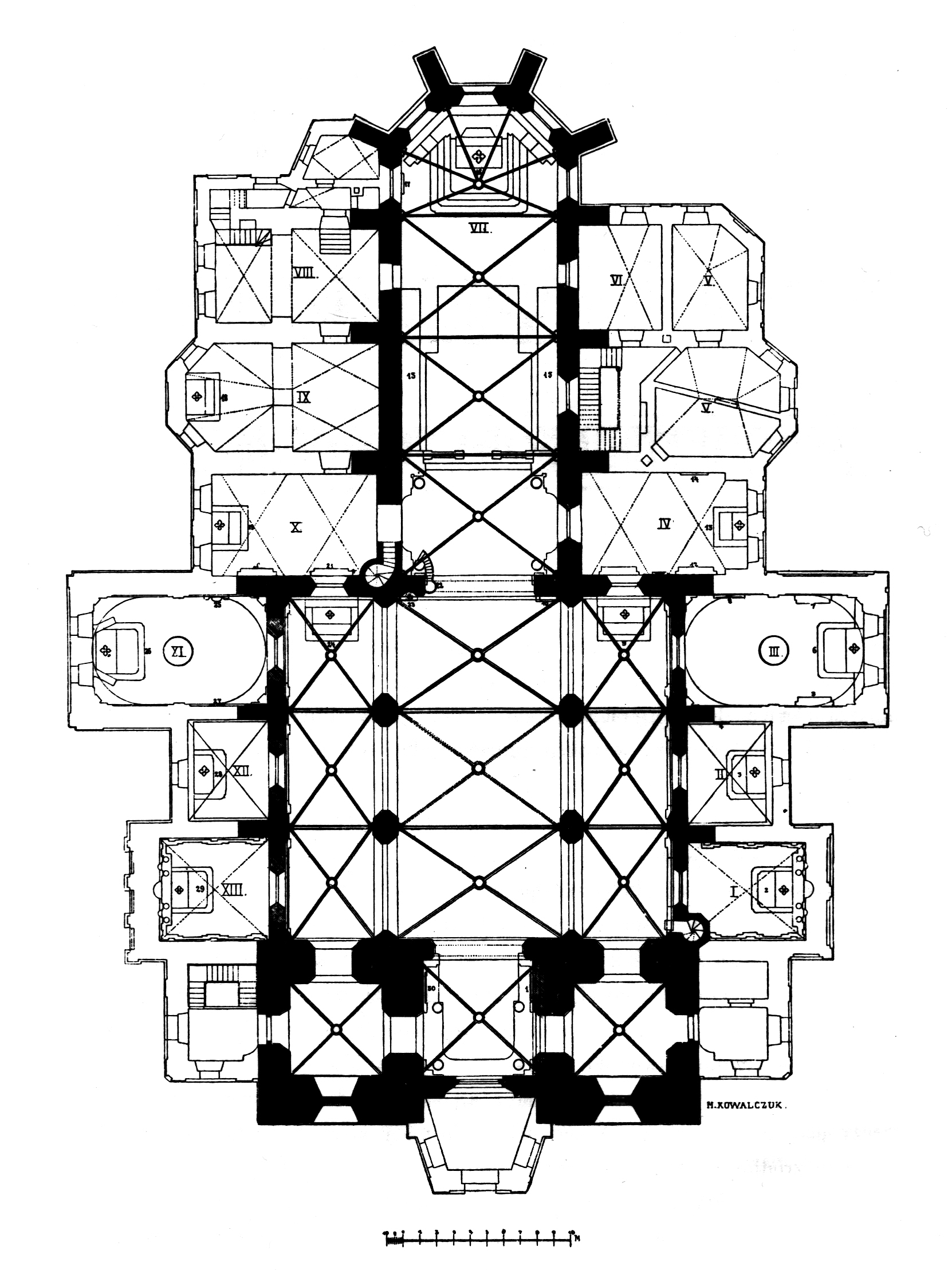 План латинської катедри у Львові. Автор Міхал Ковальчук (1855-1938).